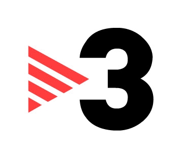 Logotip del 1r canal de Televisió de Catalunya, TV3